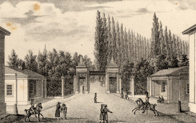 Das Durlacher Tor (schätzungsweise von der Lange Str. (heute Kaiserstr.) aus gesehen) mit den Bäumen der Durlacher Allee im Hintergrund.